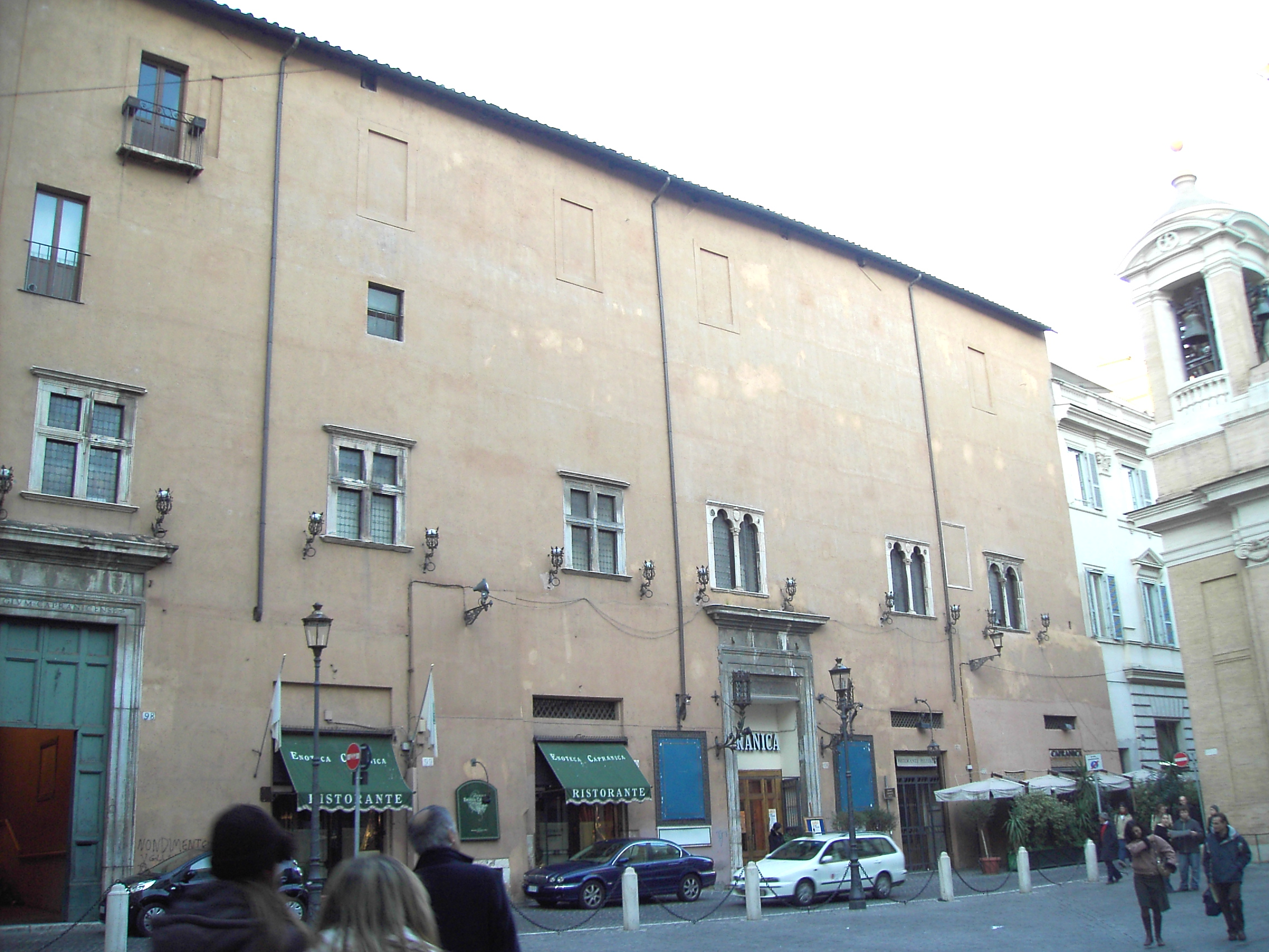 Roma, Palazzo e teatro Capranica